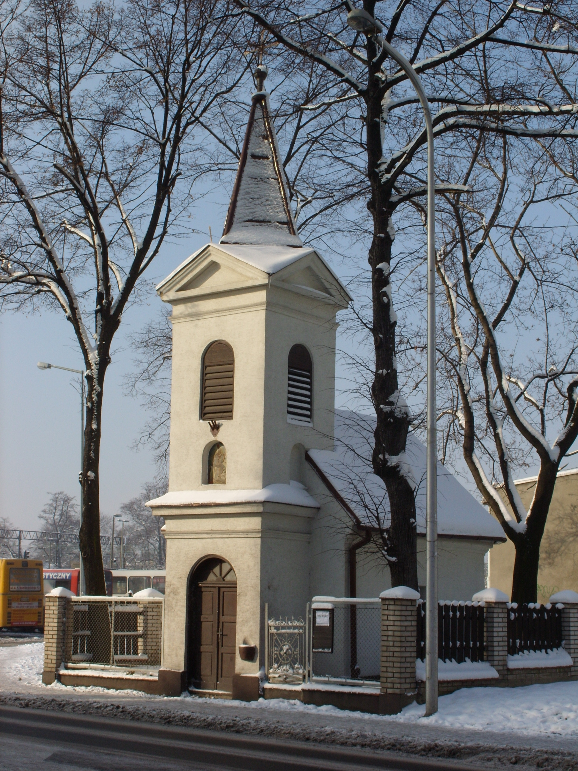 kaplica św. Floriana w Żywcu